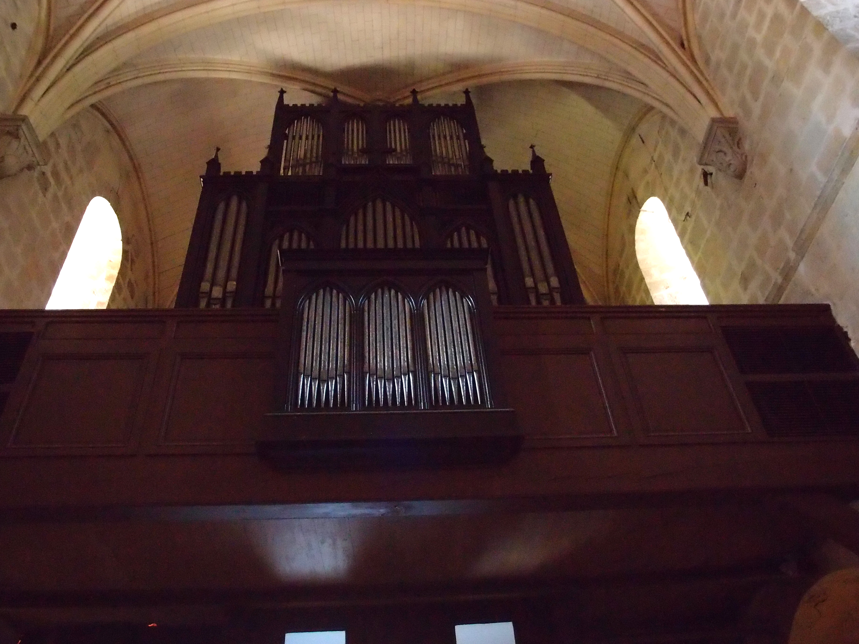 Étretat: Liebfrauenkirche Notre-Dame d'Étretat - Orgel von Cavaillé-Coll aus dem 19. Jahrhundert Datum: 13.05.2012 Urheber: M. Pfeiffer alias Benutzer:Gordito1869 Quelle: privates Fotoarchiv des Urhebers